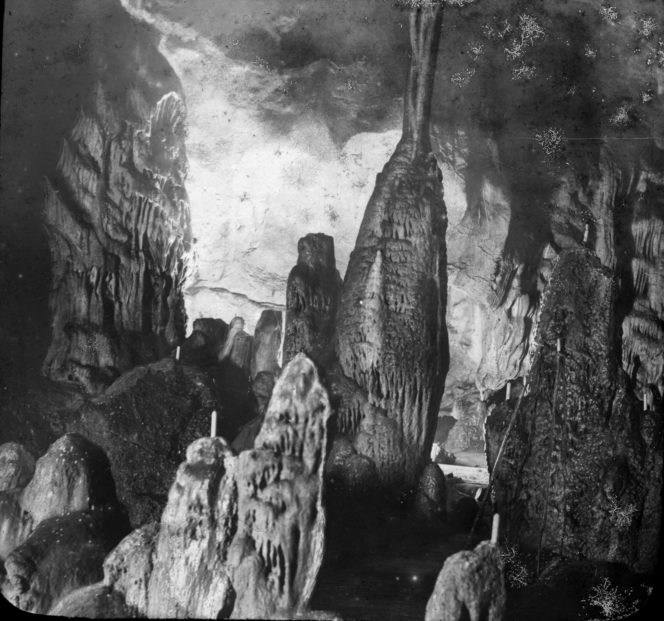 Fonds Trutat - Photographie ancienne Cote : TRU C 207 Localisation : Fonds ancien Original non communicable Titre : Grotte de Gargas, Luchon [environs] / [cliché Félix Régnault] Auteur : Regnault Rôle de l’auteur : Photographe Lieu de création : Aventignan (Hautes-Pyrénées) Date de création : : 1859-1908 [entre] Mesures : 9 x 10 cm Mot(s)-clé(s) : -- Grotte -- Roche -- Calcaire -- Stalactite -- Stalagmite -- Voûte -- Aventignan (Hautes-Pyrénées) -- Gargas, Grotte de (France) -- Baronnies, Les (Hautes-Pyrénées) -- 19e siècle, 2e moitié -- 20e siècle, 1e quart Médium : Photographies -- Négatifs sur plaque de verre -- Noir et blanc -- Détails Bibliothèque de Toulouse. Domaine public